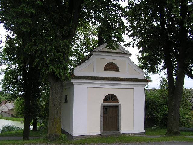 Kaplička na návsi